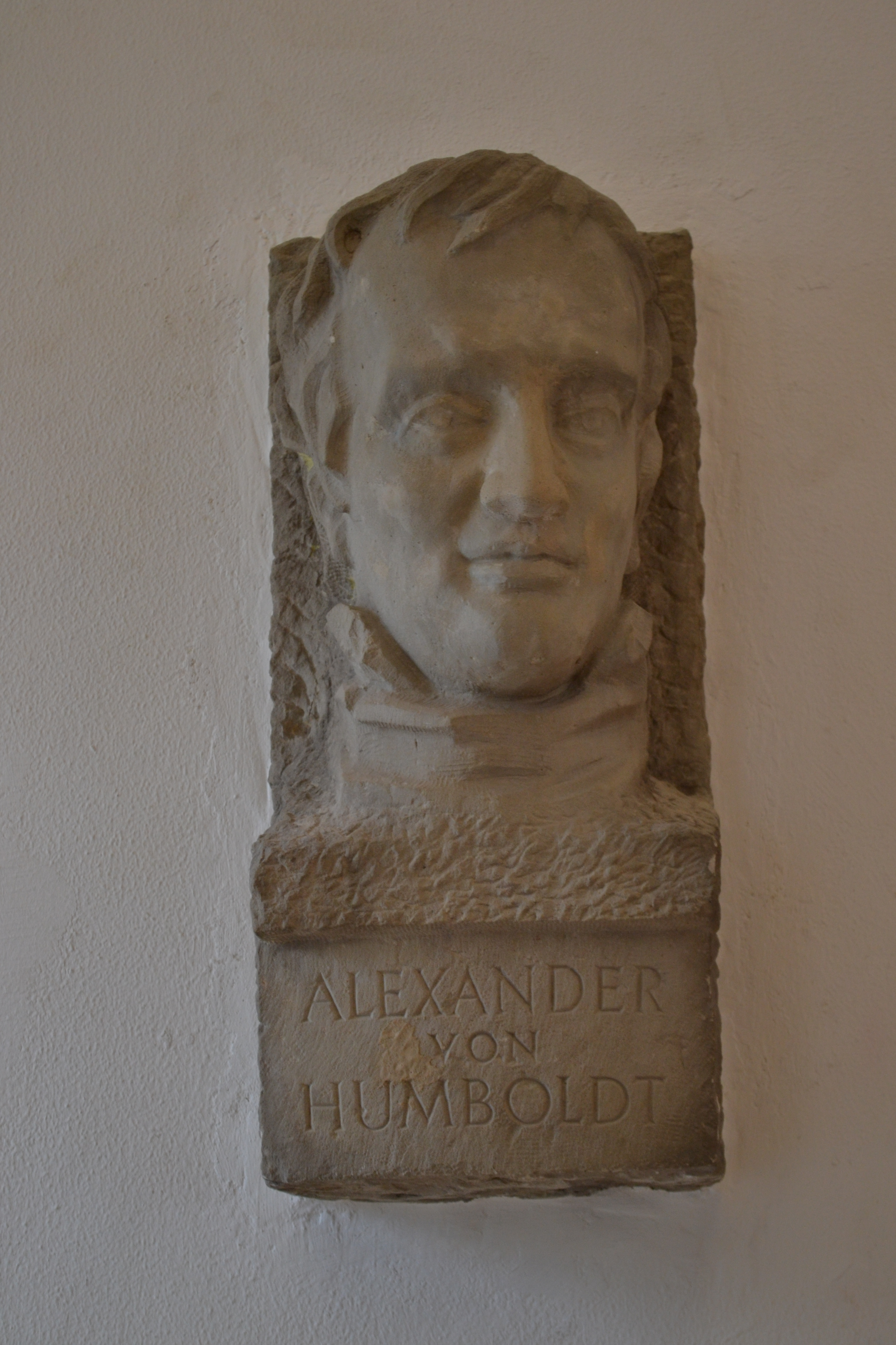 Gipsbüste "Alexander von Humboldt" von Ivo Beucker (1955) Aula des Humboldt-Gymnasiums Düsseldorf